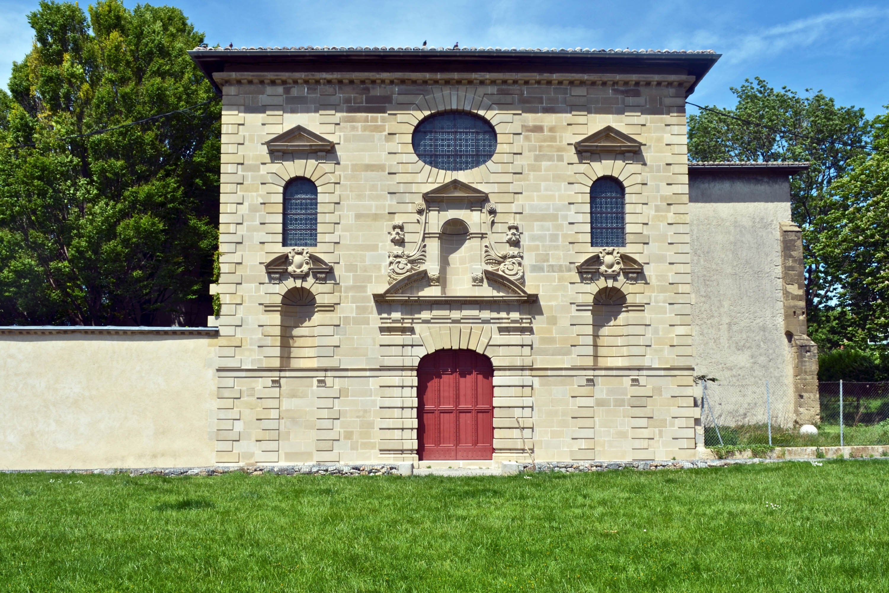 Ancienne abbaye bénédictine Notre-Dame de Soyons à Valence, Drôme, France. Façade de l’église XVIIe s.